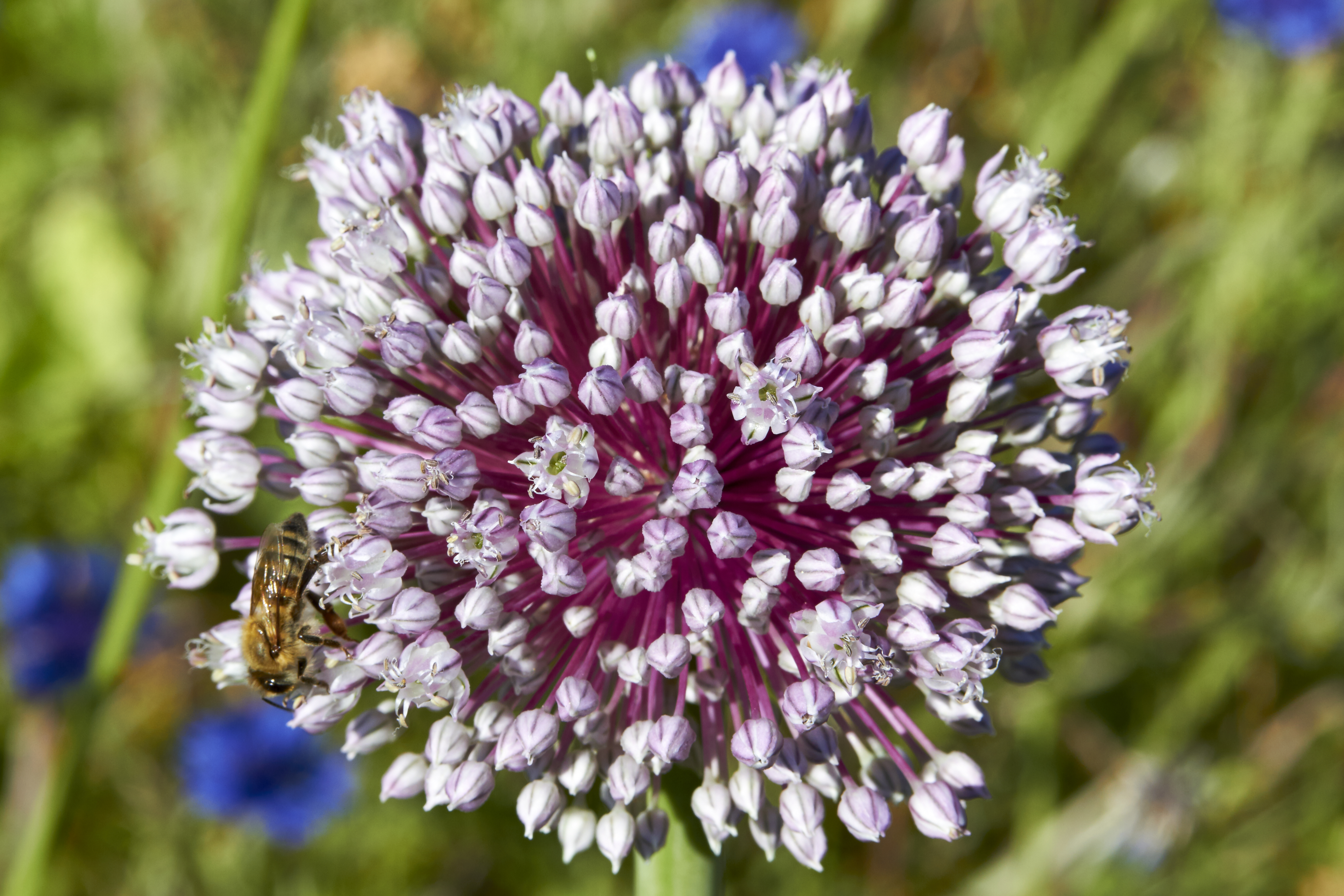 Blüte einer Lauchpflanze, voll geöffnet.